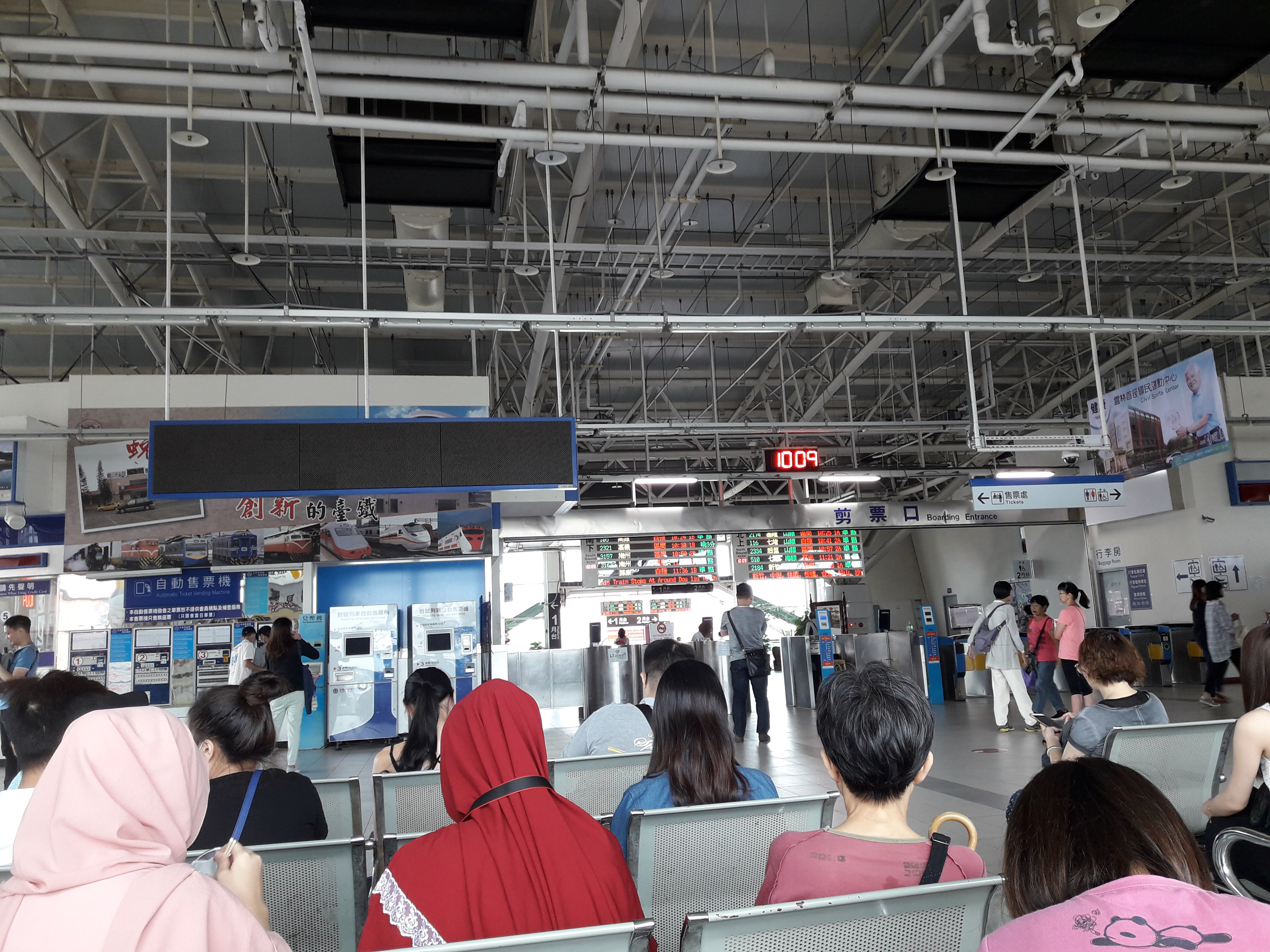 中文（台灣）: 臺灣鐵路管理局斗六車站候車大廳。